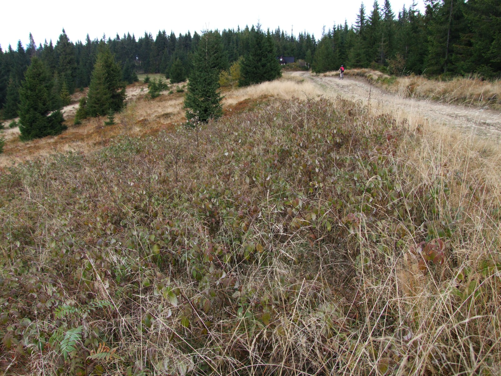 Polana Rusnakowa pod Turbaczem